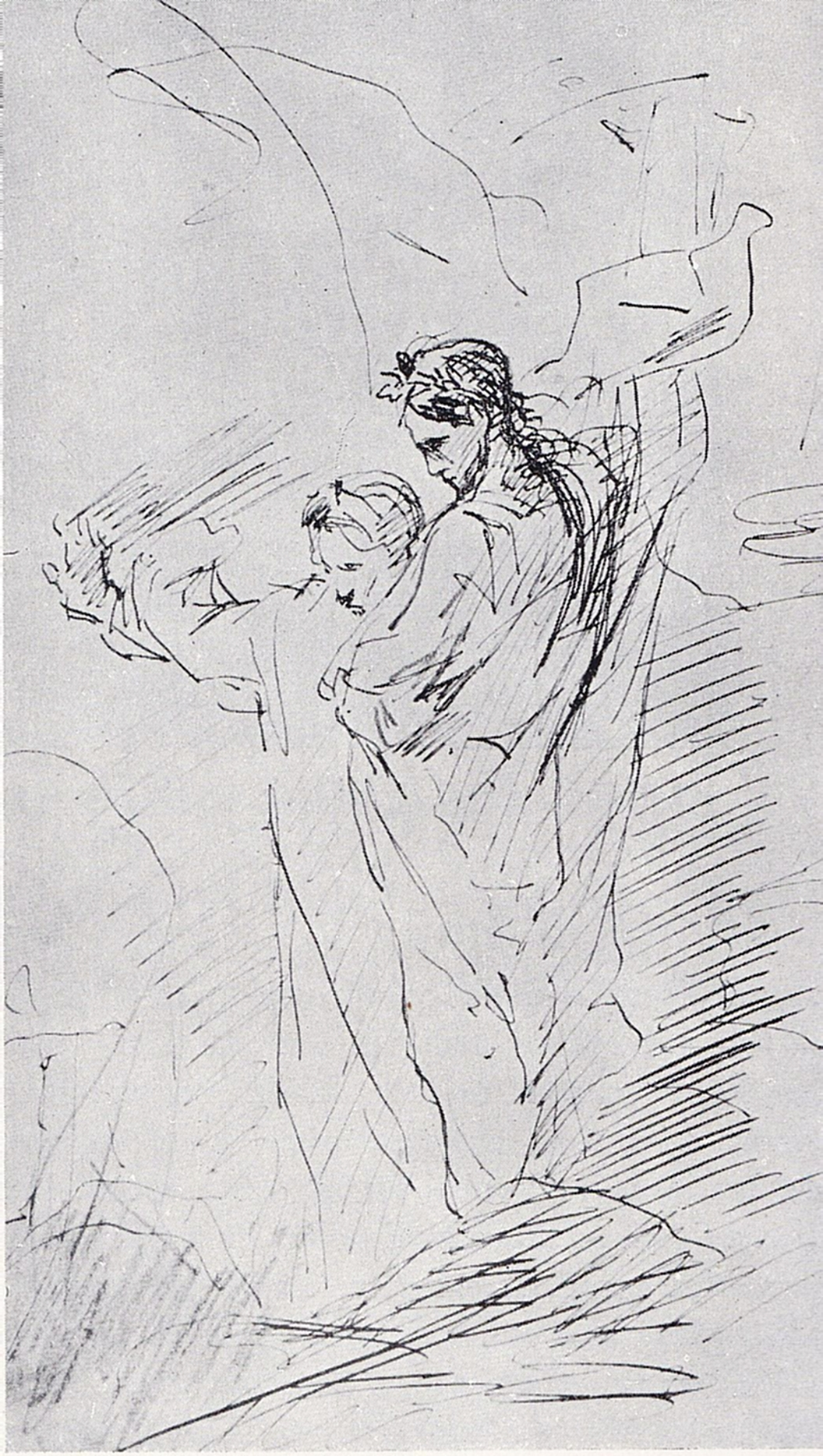 Dante si Virgiliu (dupa Delacroix - 1863 - 1864)